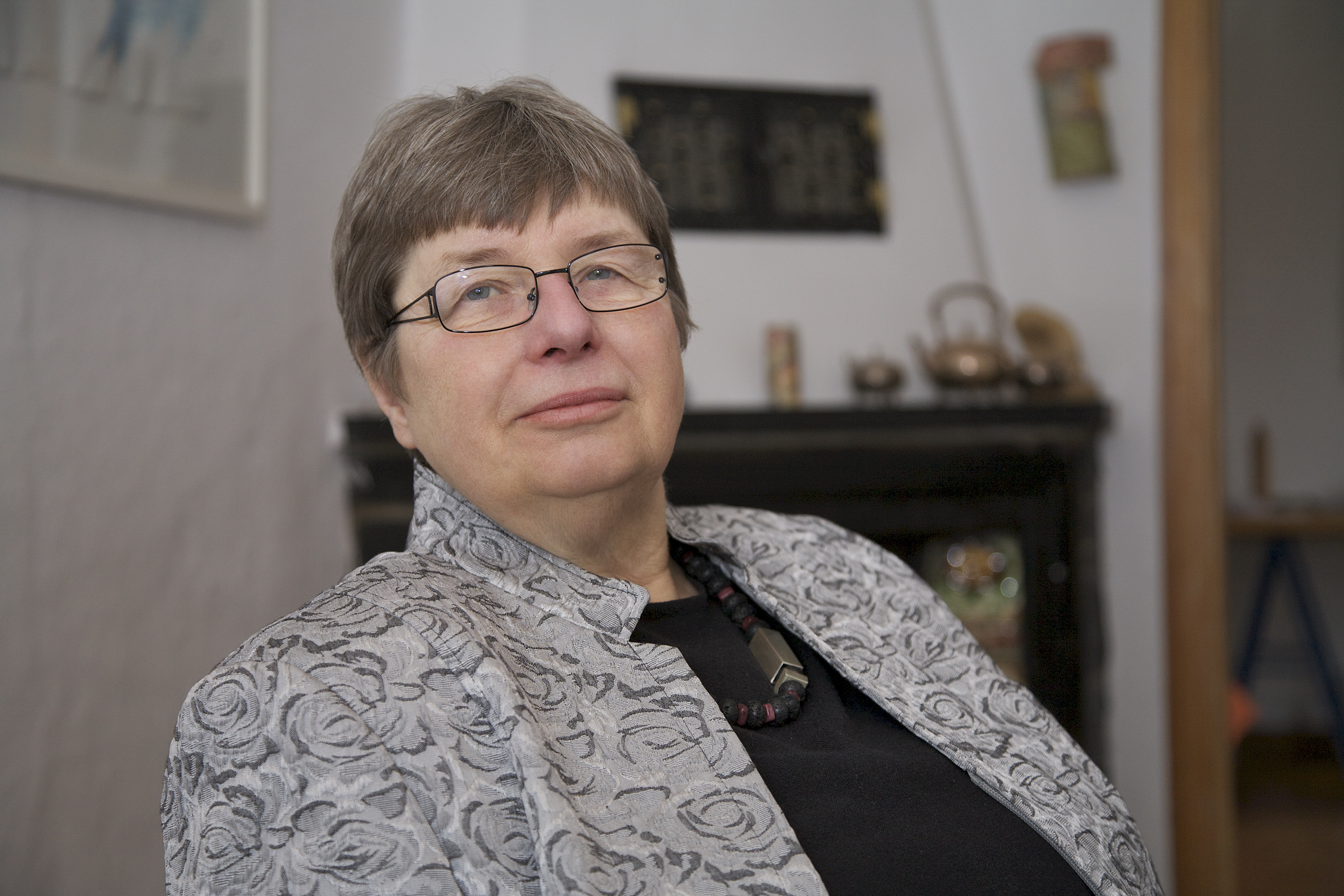 Sibylle Plogstedt sitzend